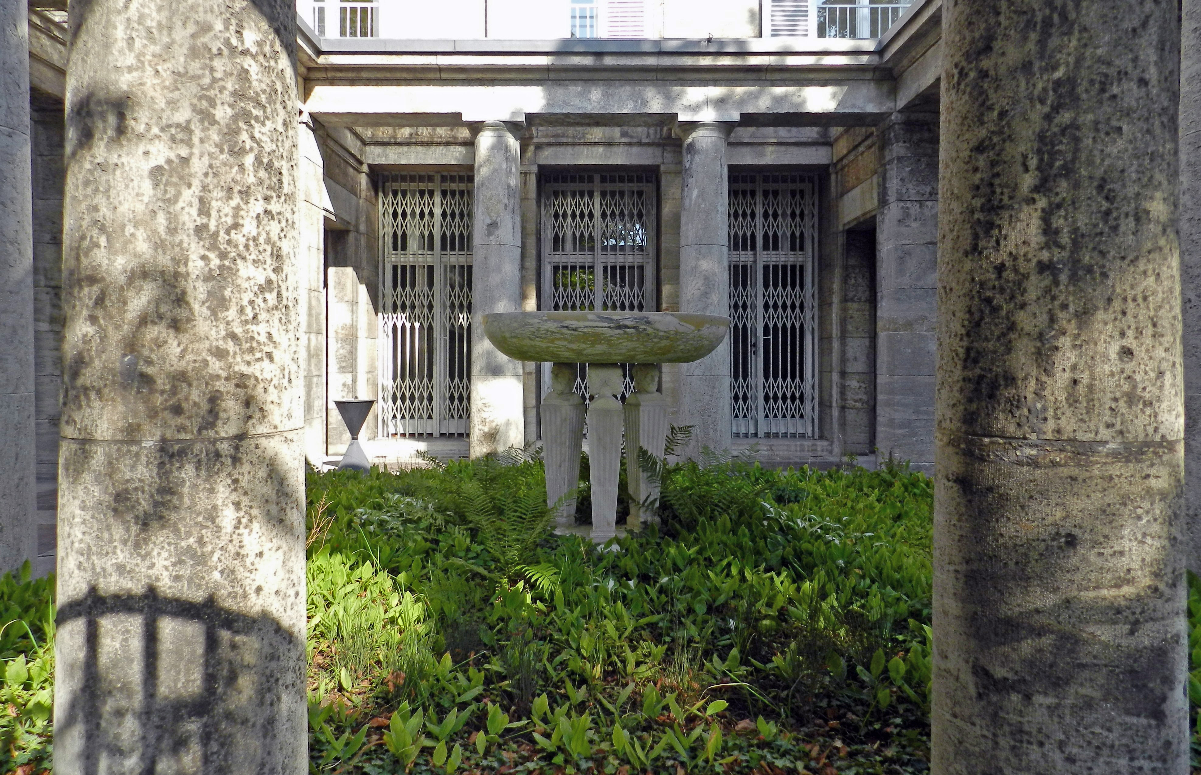 Gartendetail des Landhauses Peter-Lenné-Str. 28-30, Berlin-Dahlem. Bauzeit: 1911-12, Entwurf: Peter Behrens, Bauherr: Archäologe Theodor Wiegand.